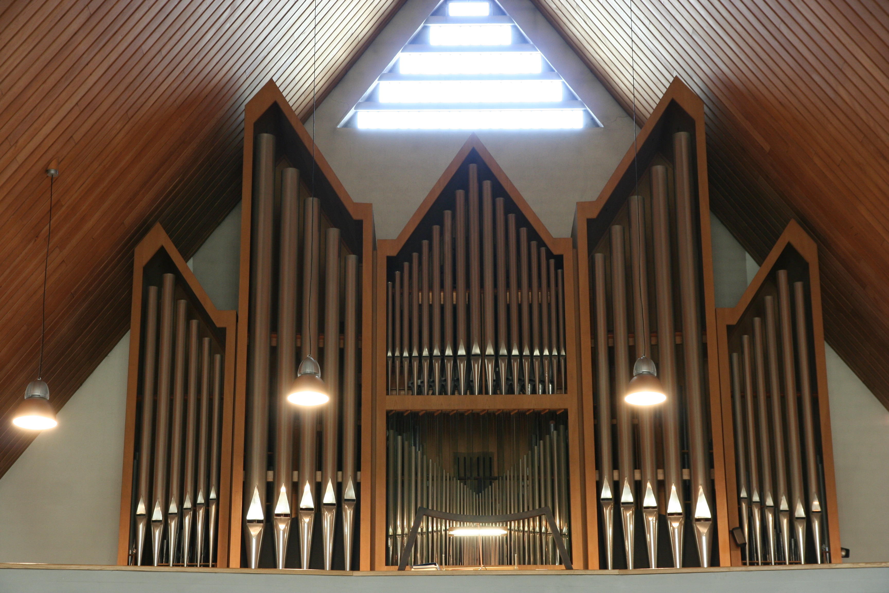 Katholische Kirche St. Jakobus Steckborn TG